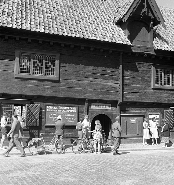 Burmeisterska huset från 1600-talets mitt vid Strandgatan. Bilden troligen från 1940-talets första hälft. Motiv: Visby Nyckelord: Byggnadsminnen, Riksintressen, Världsarv Kategori: Borgargård, StadsmiljöBurmeisterska huset från 1600-talets mitt vid Strandgatan. Bilden troligen från 1940-talets första hälft.